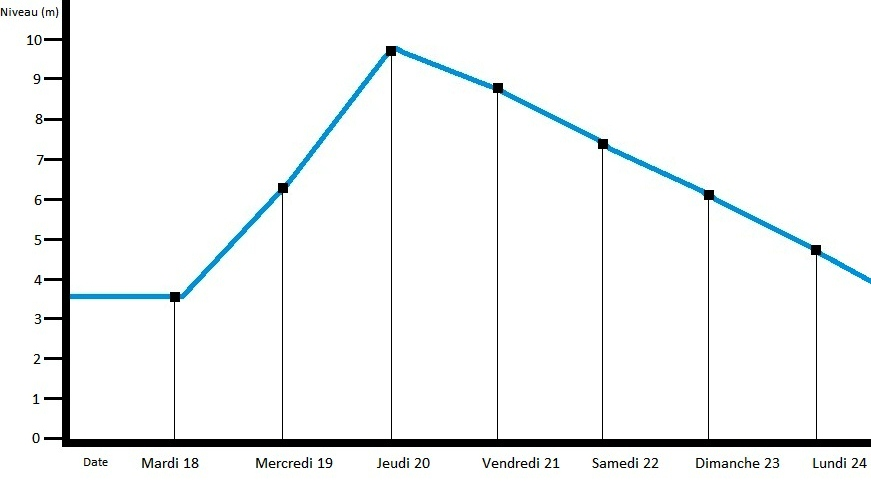 Graphique du niveau de la crue du Doubs de 1910 à Besançon (Doubs, France).